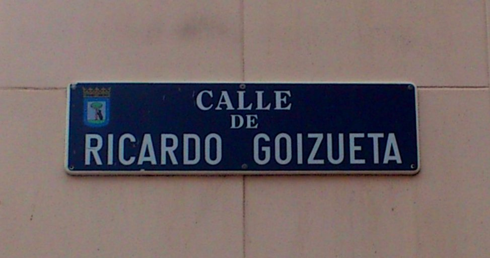 Placa de la calle Ricardo Goizueta, en Madrid (España)